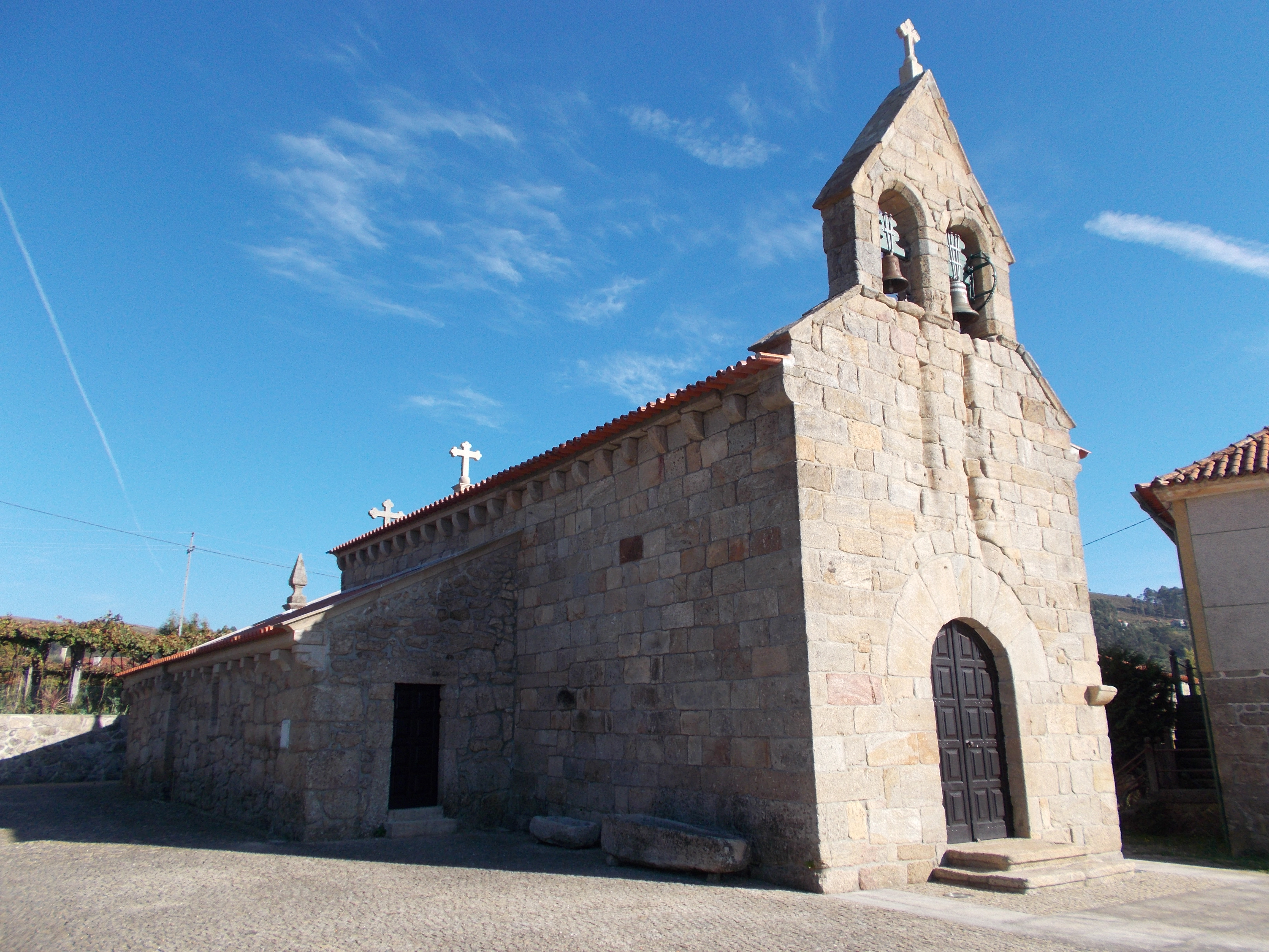 Igreja romanica de Pedregais